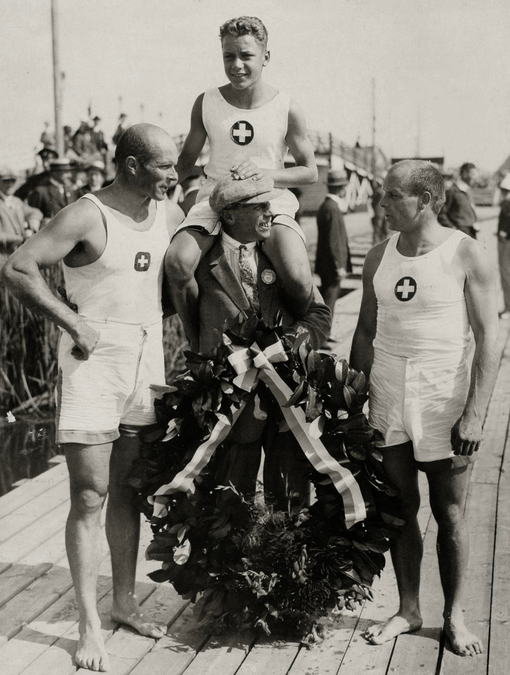 Olympische Spelen Amsterdam, Nederland, 1928: Roeien, twee met stuurman. De Zwitserse roeiploeg poseert trots na het behalen van goud. H. Schochlin, K. Schochlin, H. Bourguin